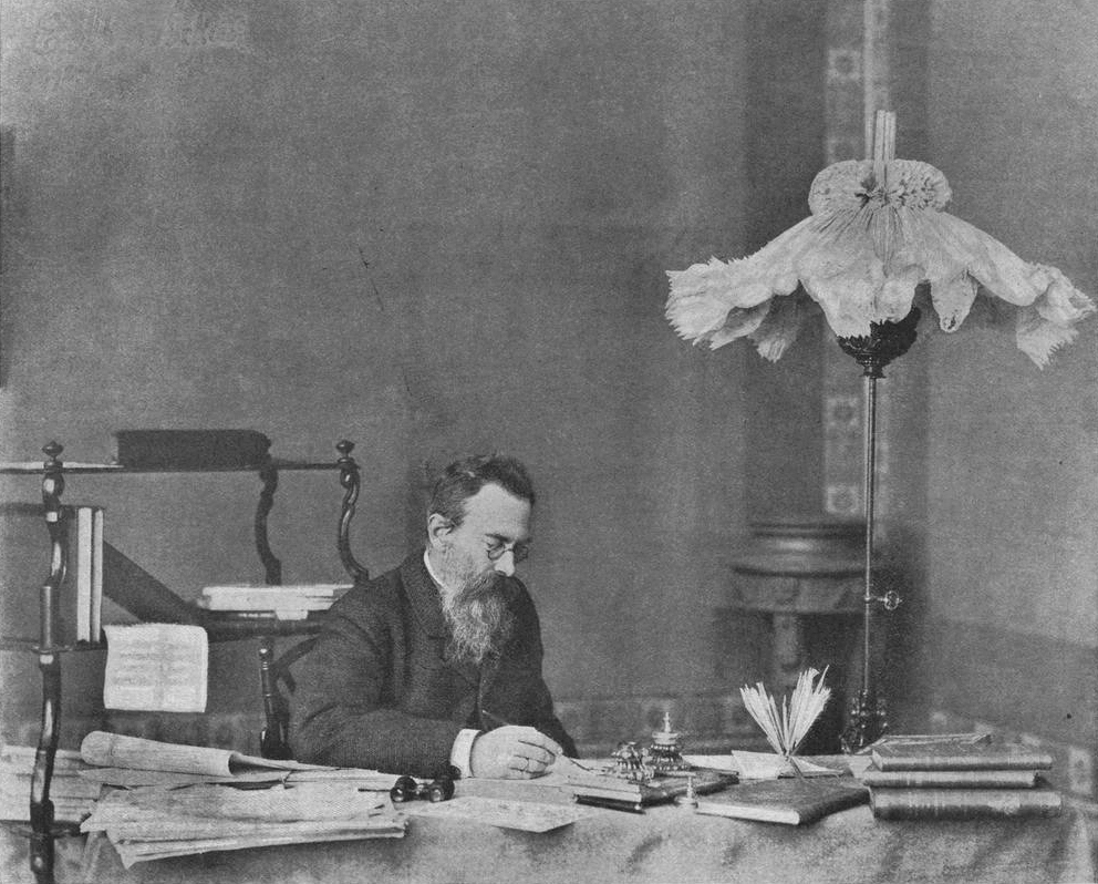 Николай Андреевич Римский-Корсаков в своем кабинете.